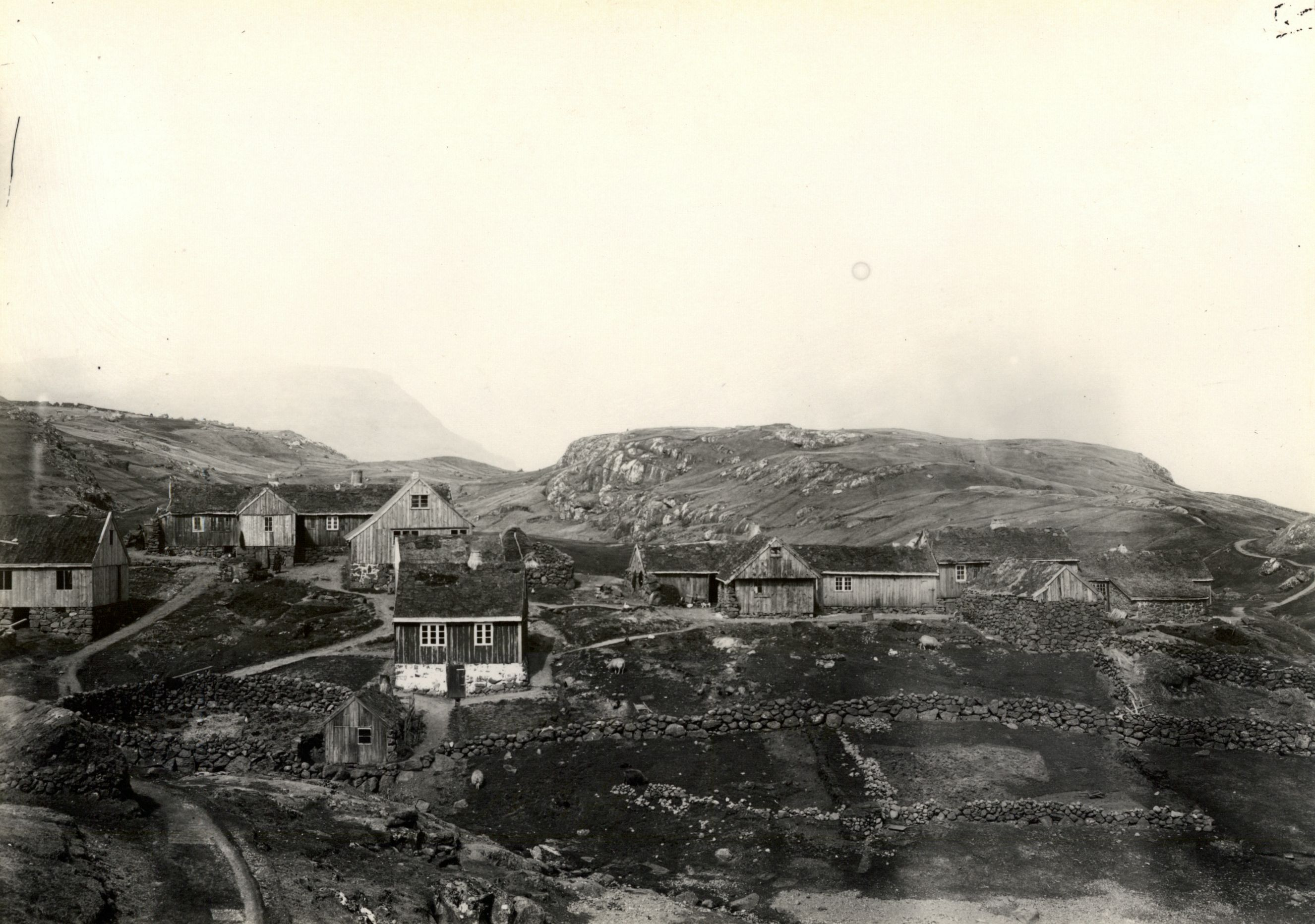 Hvítanes, Faroe Islands